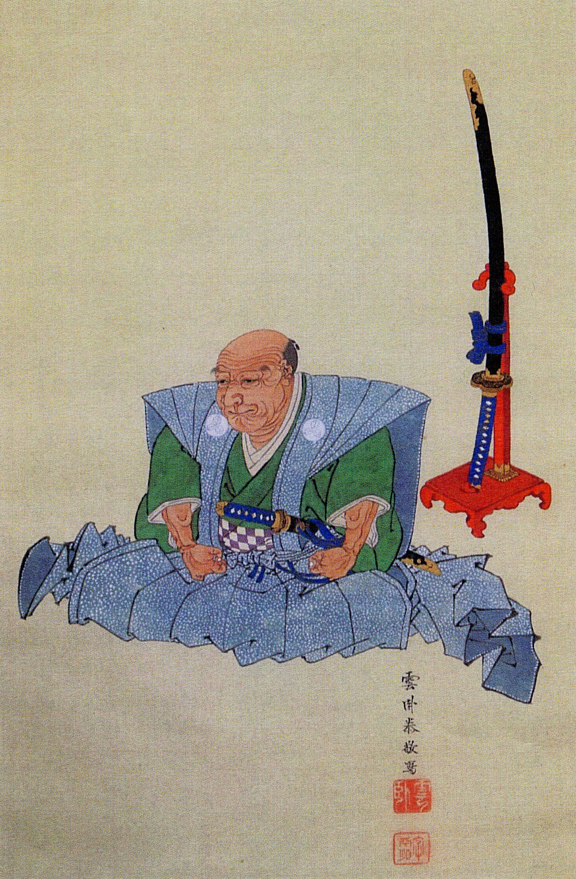 講武所頭取・窪田清音の肖像画。